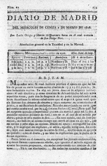 Diario de Madrid (siglo XIX), primer diario publicado en España y uno de los primeros del mundo